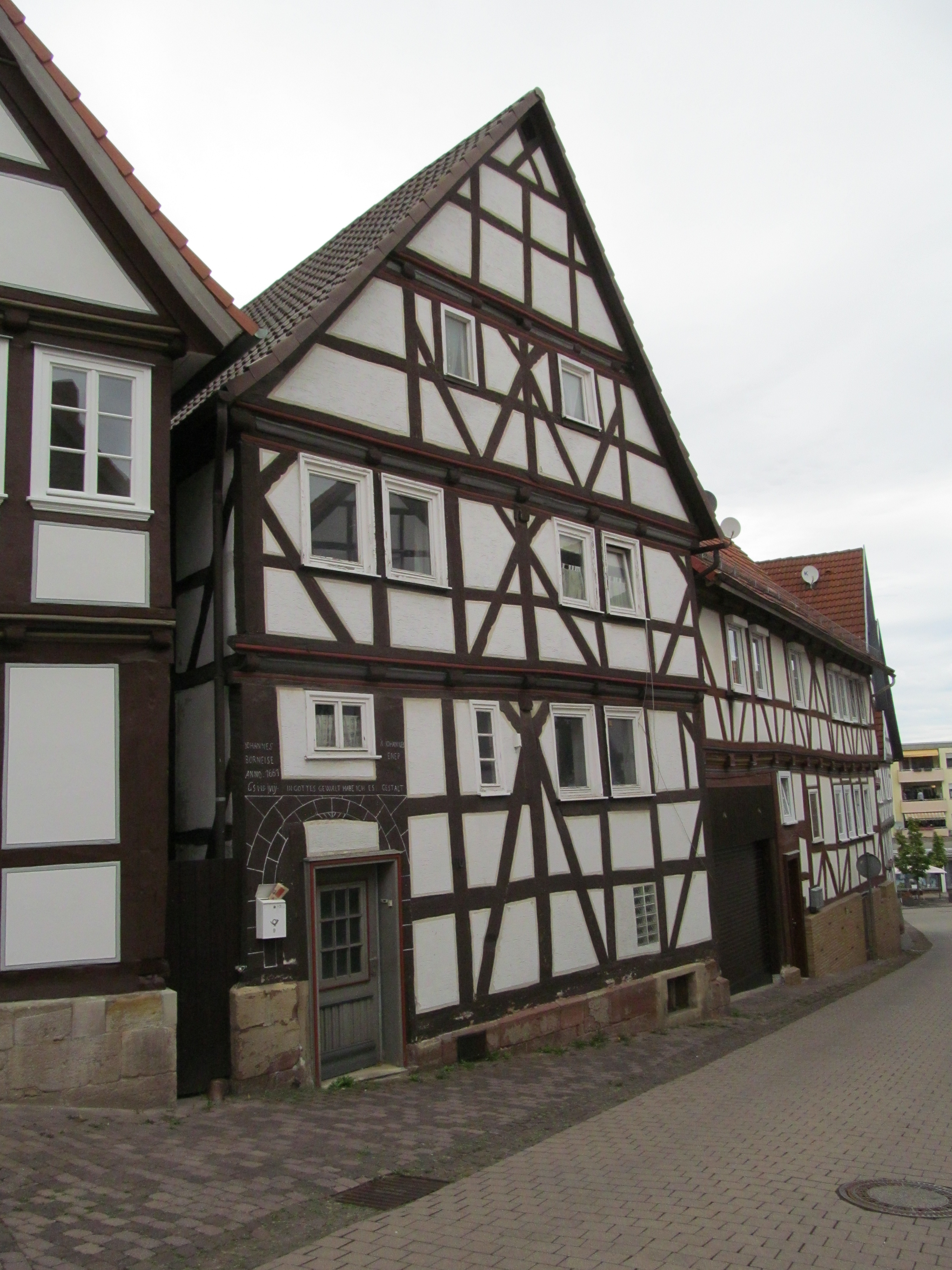 das Haus Hintergasse 10 in Gudensberg